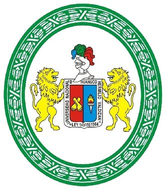 Escudo de la UNHEVAL